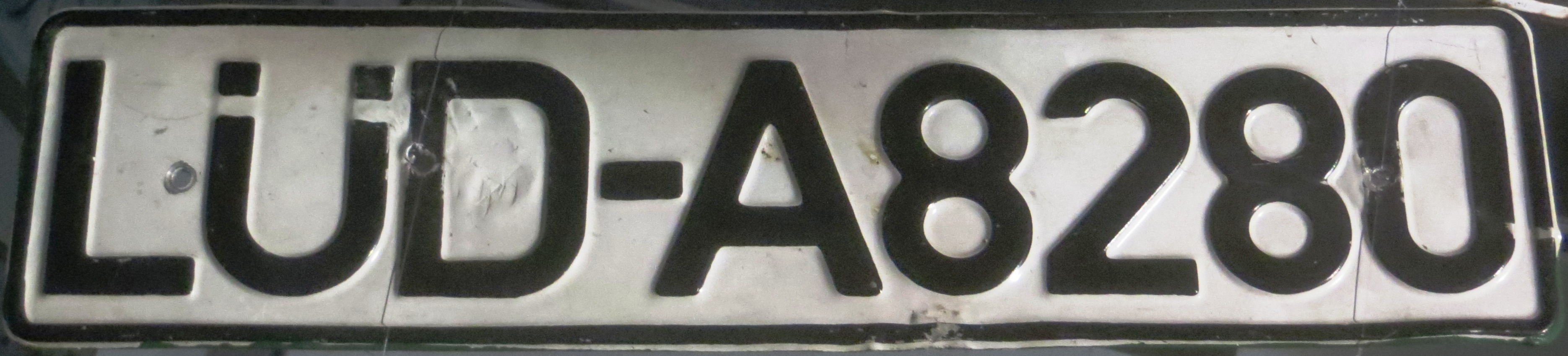 Oude Duitse kentekenplaat